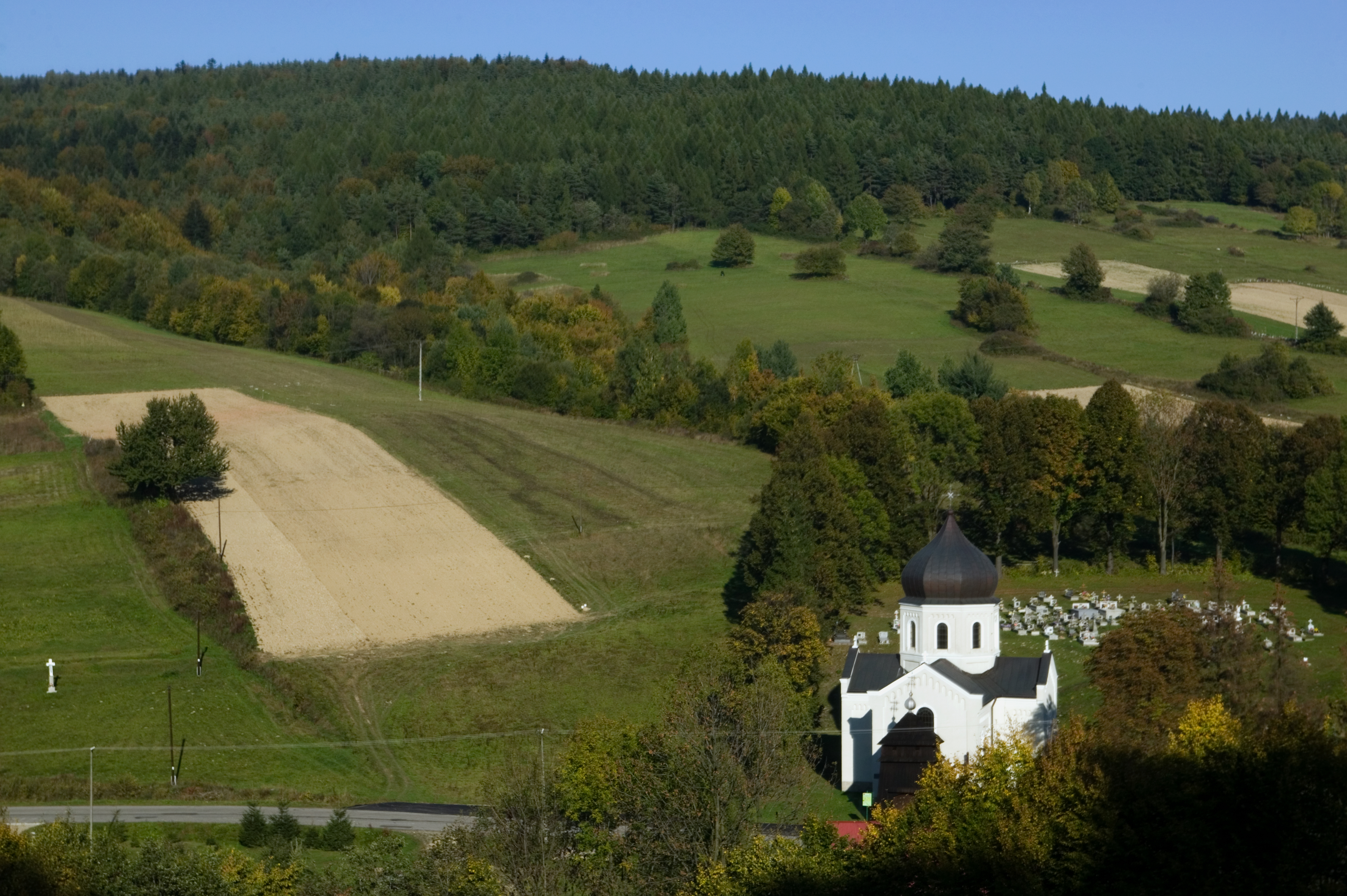 Cerkiew św. Paraskewy we wsi Pętna